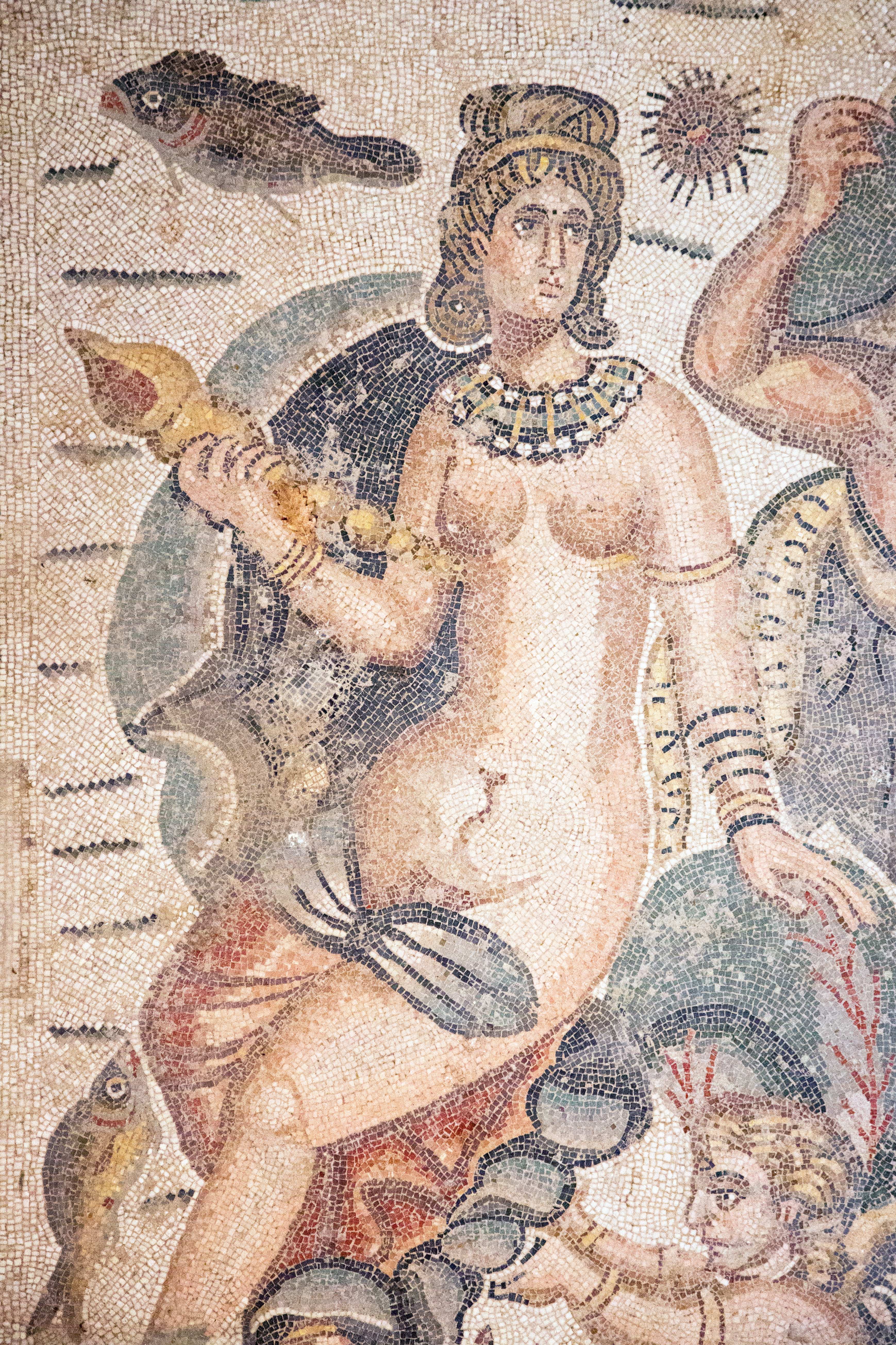 Full collection of Villa Romana del Casale photos here